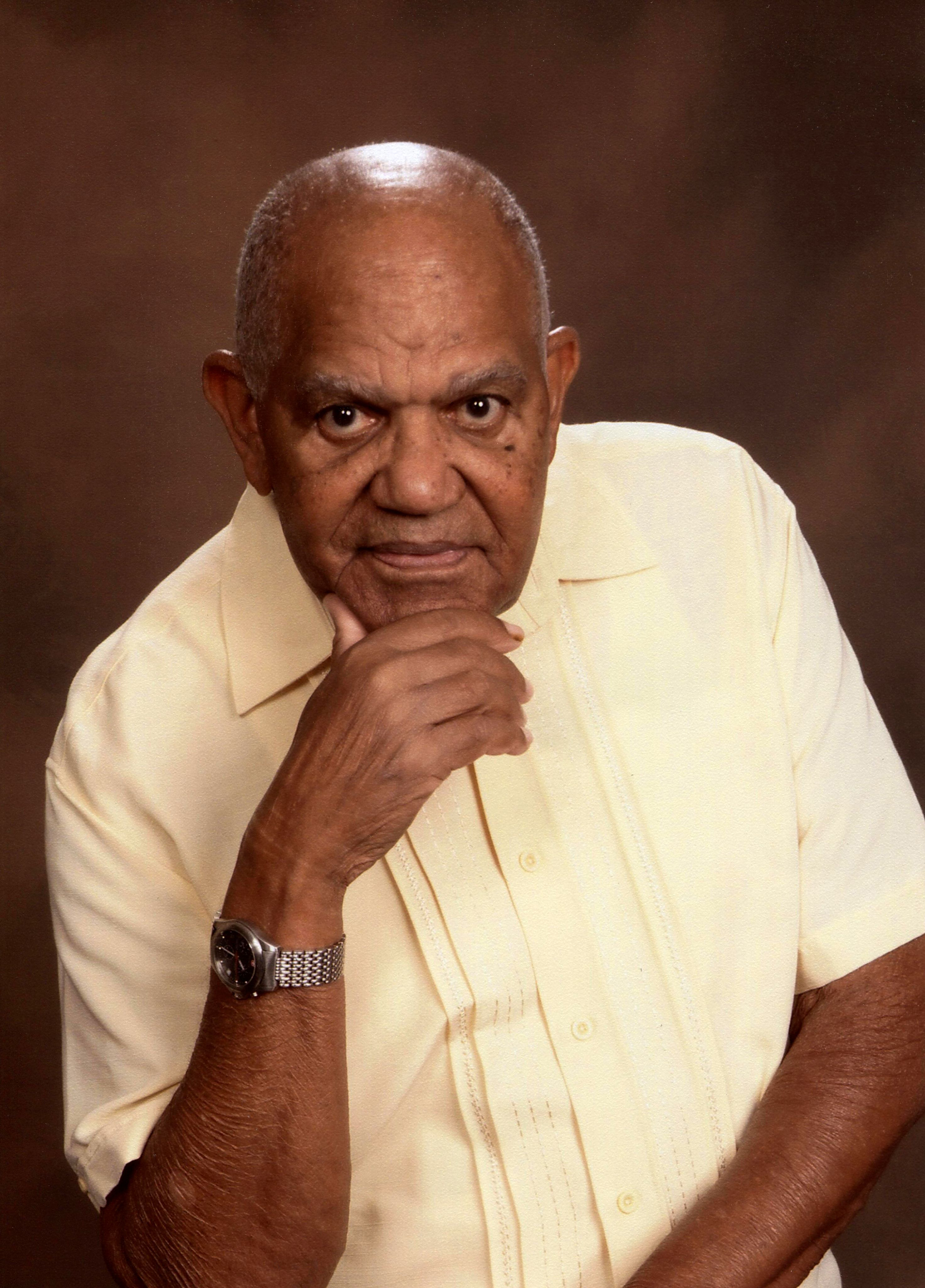 Ignacio Cárdenas Acuña